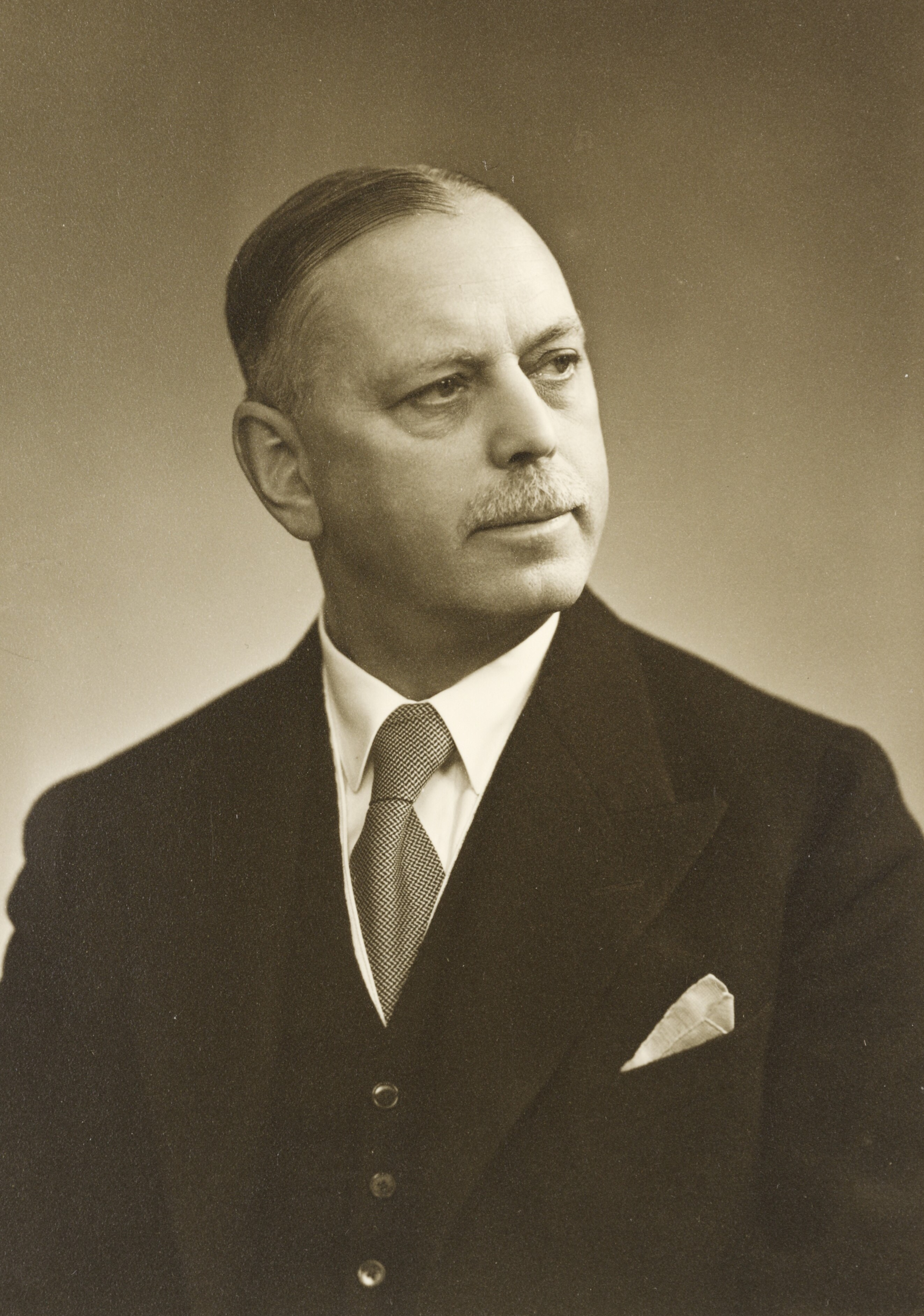 Halfdan Hendriksen (1881–1961) erhvervsmand og medlem af Folketinget (konservativ).